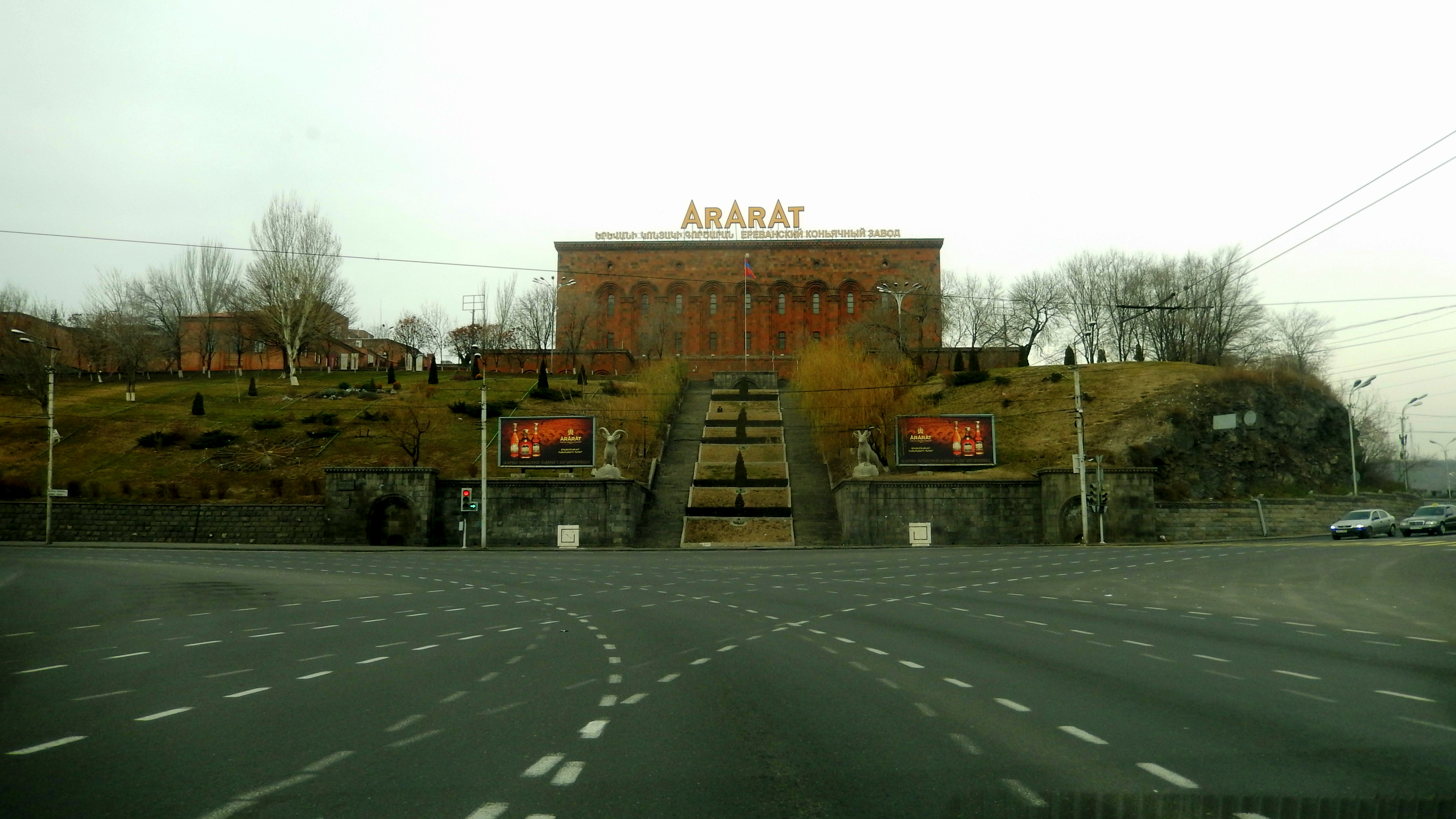 Արարատ կոնյակի գործարան 6/7.2